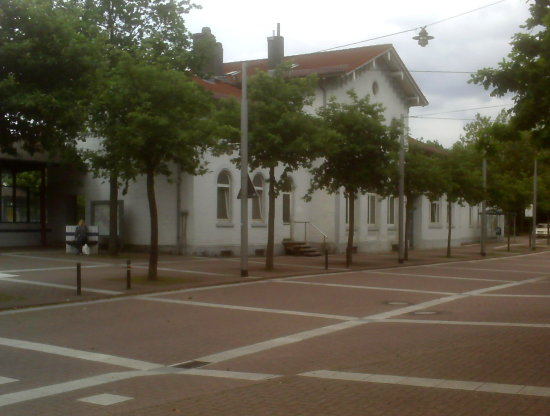 Achim: Bahnhof